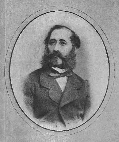 Henryk Wodzicki